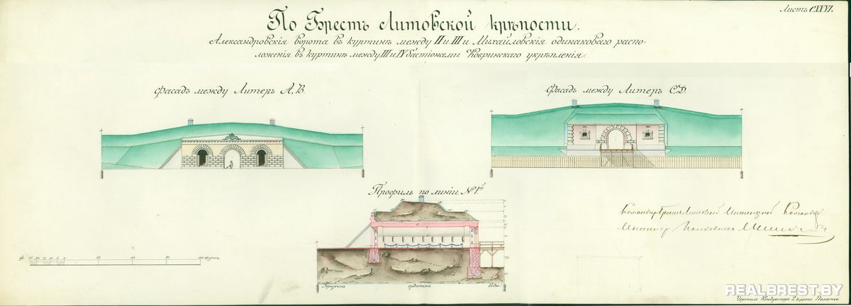 Брэсцкая крэпасць. Усходняя (Міхайлаўская) брама. План складзены для атласа крэпасці Брэст Літоўск ад ліпеня 19 дня 1867 года.